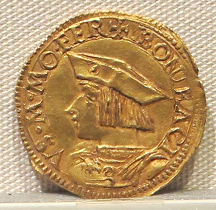 Palazzo Massimo alle Terme